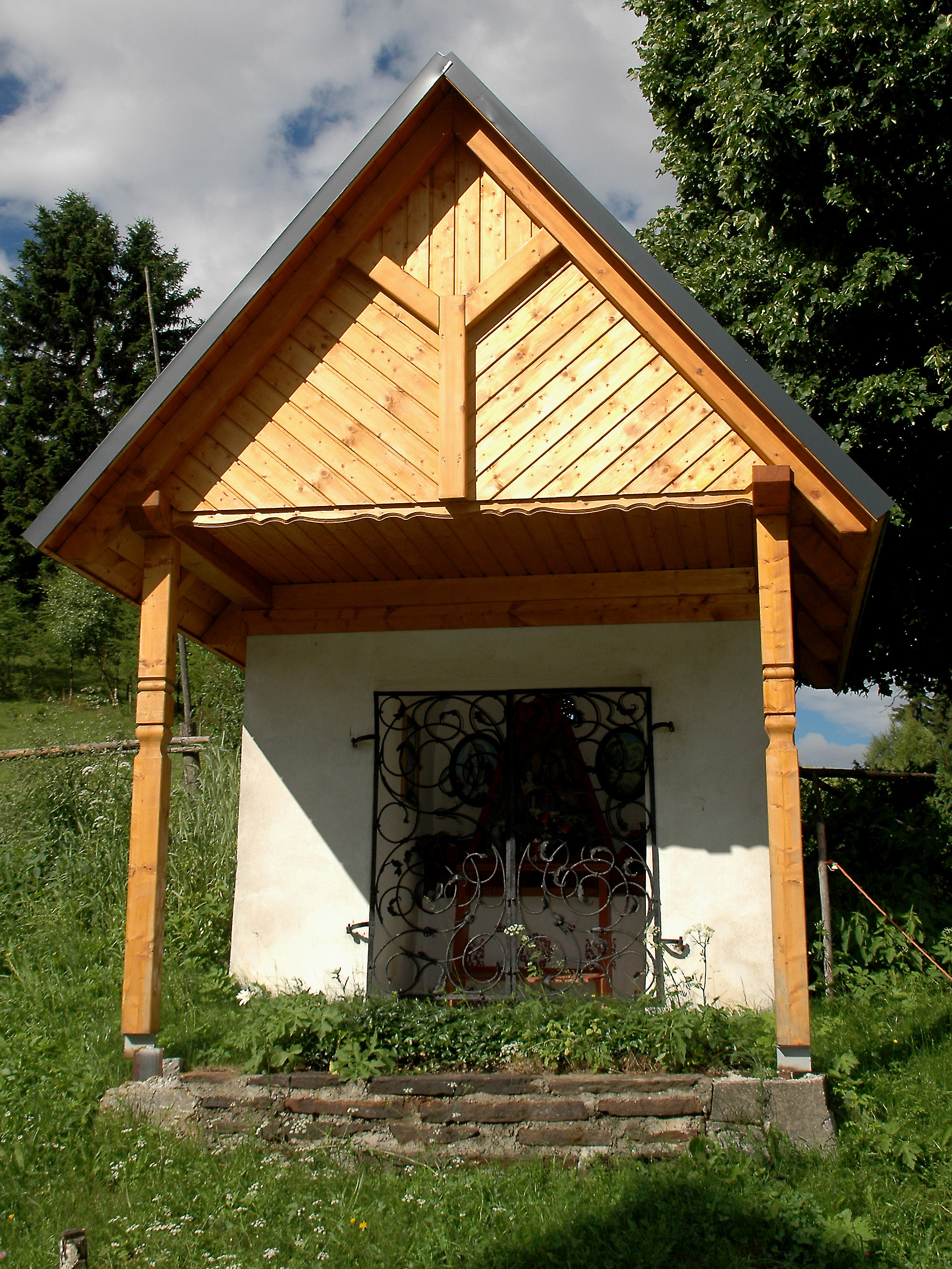 Goschkreuz Besitzer: Familie Leitner vlg. Gosch in Obdachegg 2 Dieses Kreuz wurde wahrscheinlich 1887 errichtet und wurde zuletzt 2004 renoviert. Dieses Kreuz ist bei der jährlichen Prozession am Markustag eine Station